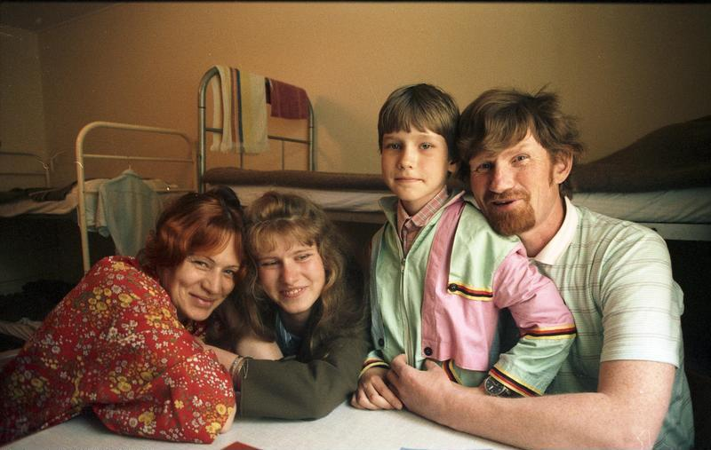 Juni 1988 Friedland Durchgangslager für Aussiedler und Flüchtlinge Eine Familie aus Sibirien